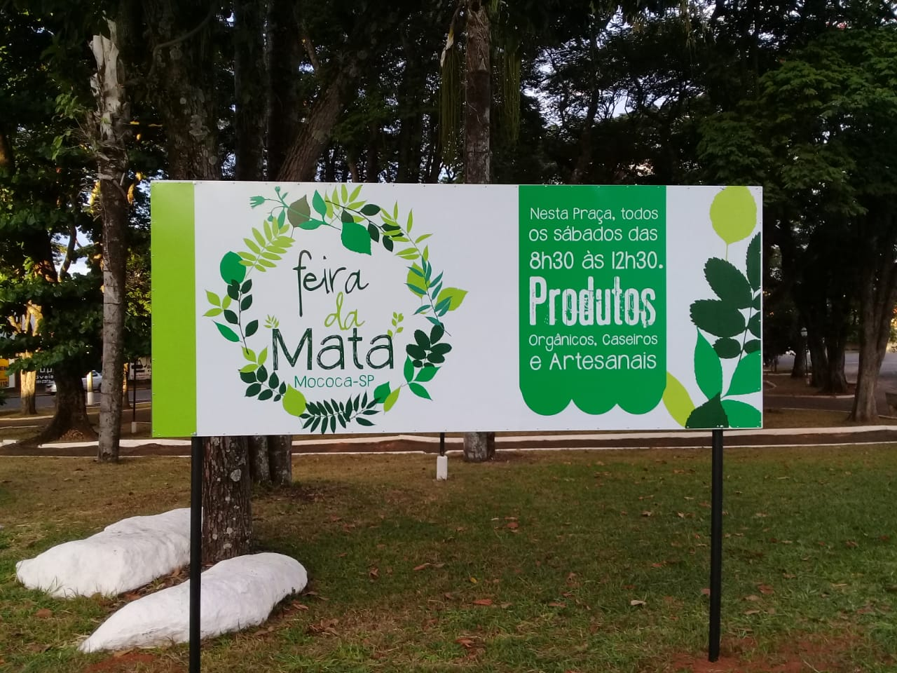 Painel da Feira da Mata na Praça Pacífico da Costa Lima.